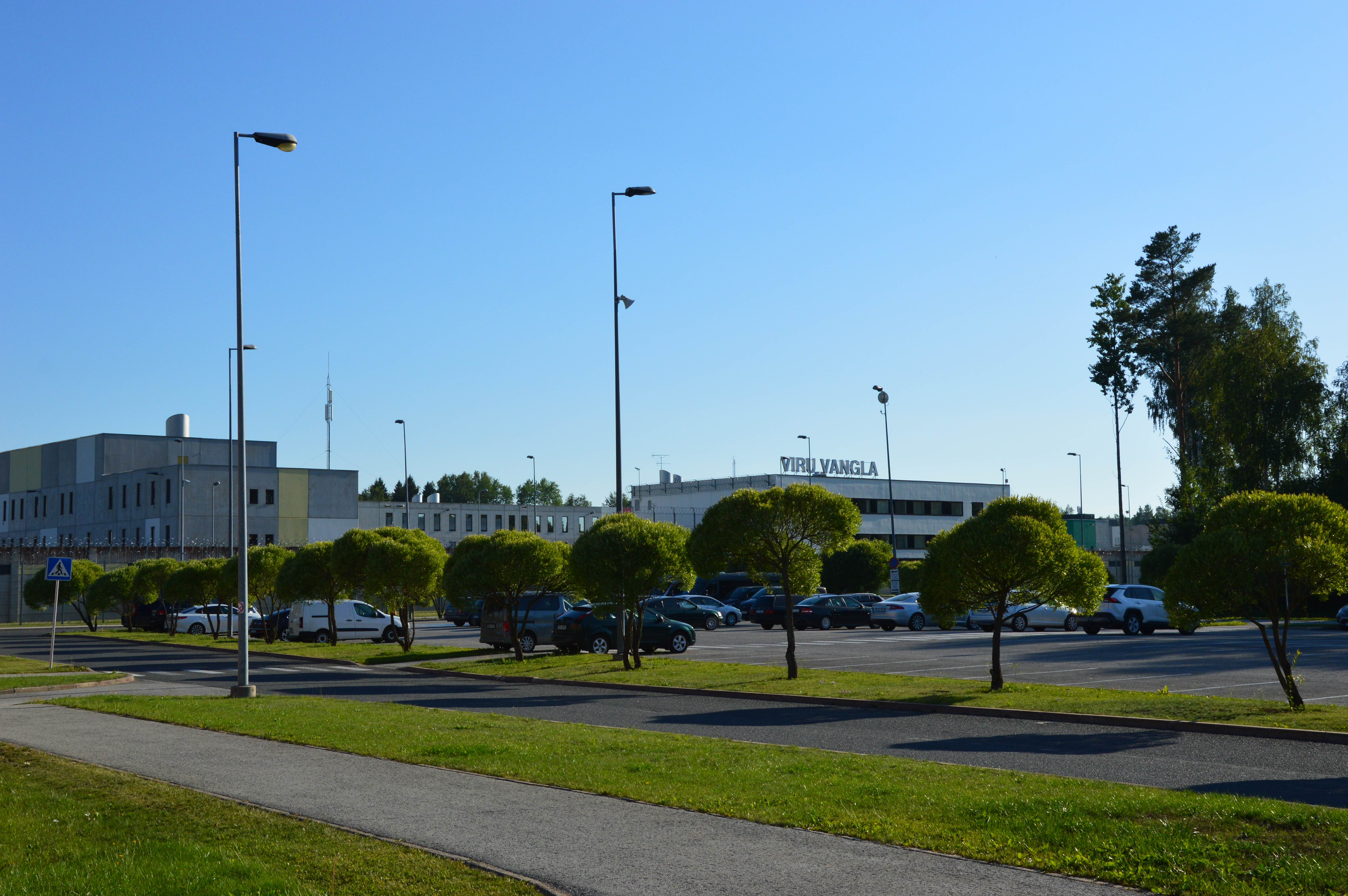 Viru vangla.